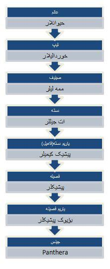 تۆرکجه: بویوک پیشیکلر الت بولوم